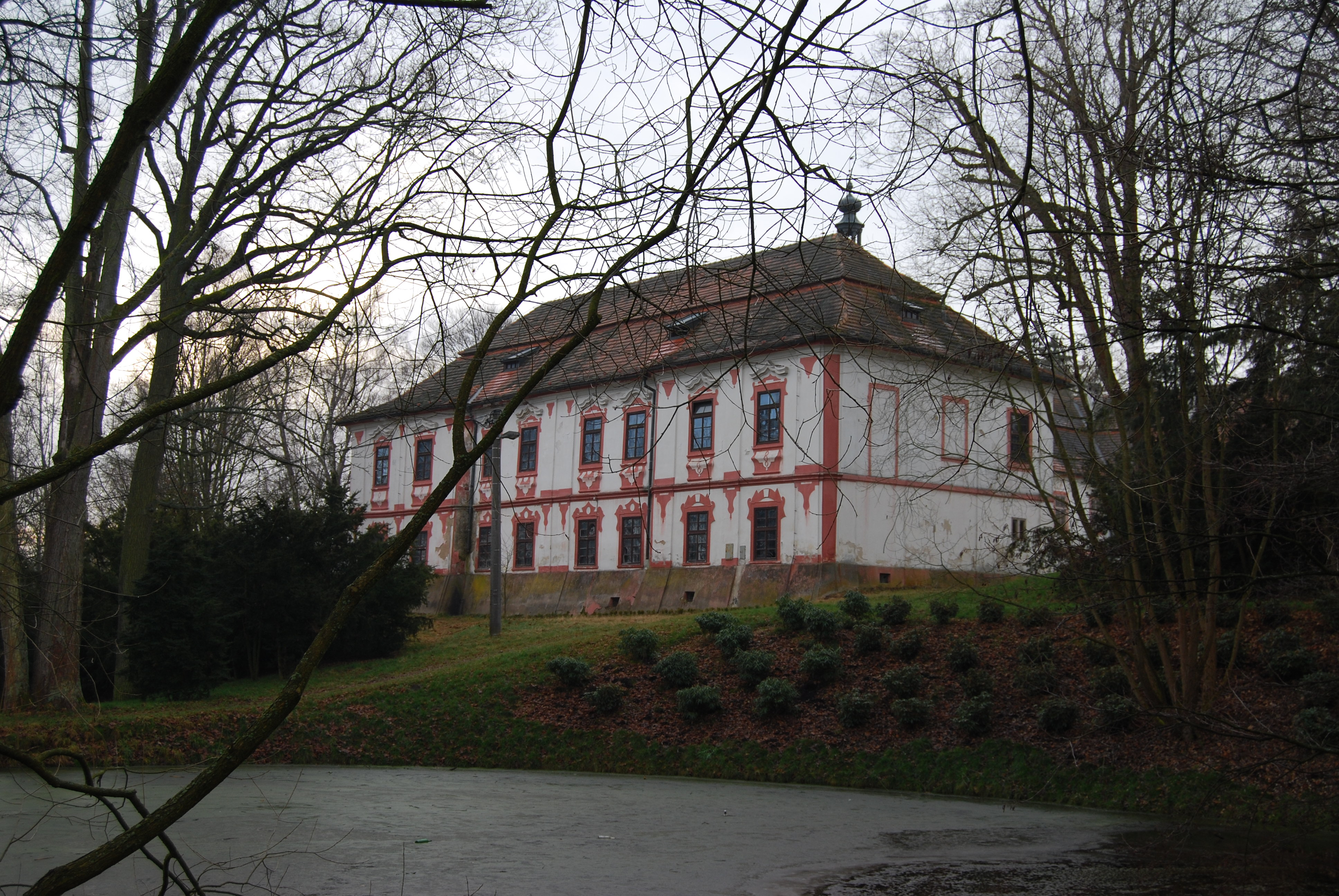 Zámek. Obec Nadějkov se nachází v okrese Tábor v Jihočeském kraji. Česká republika.